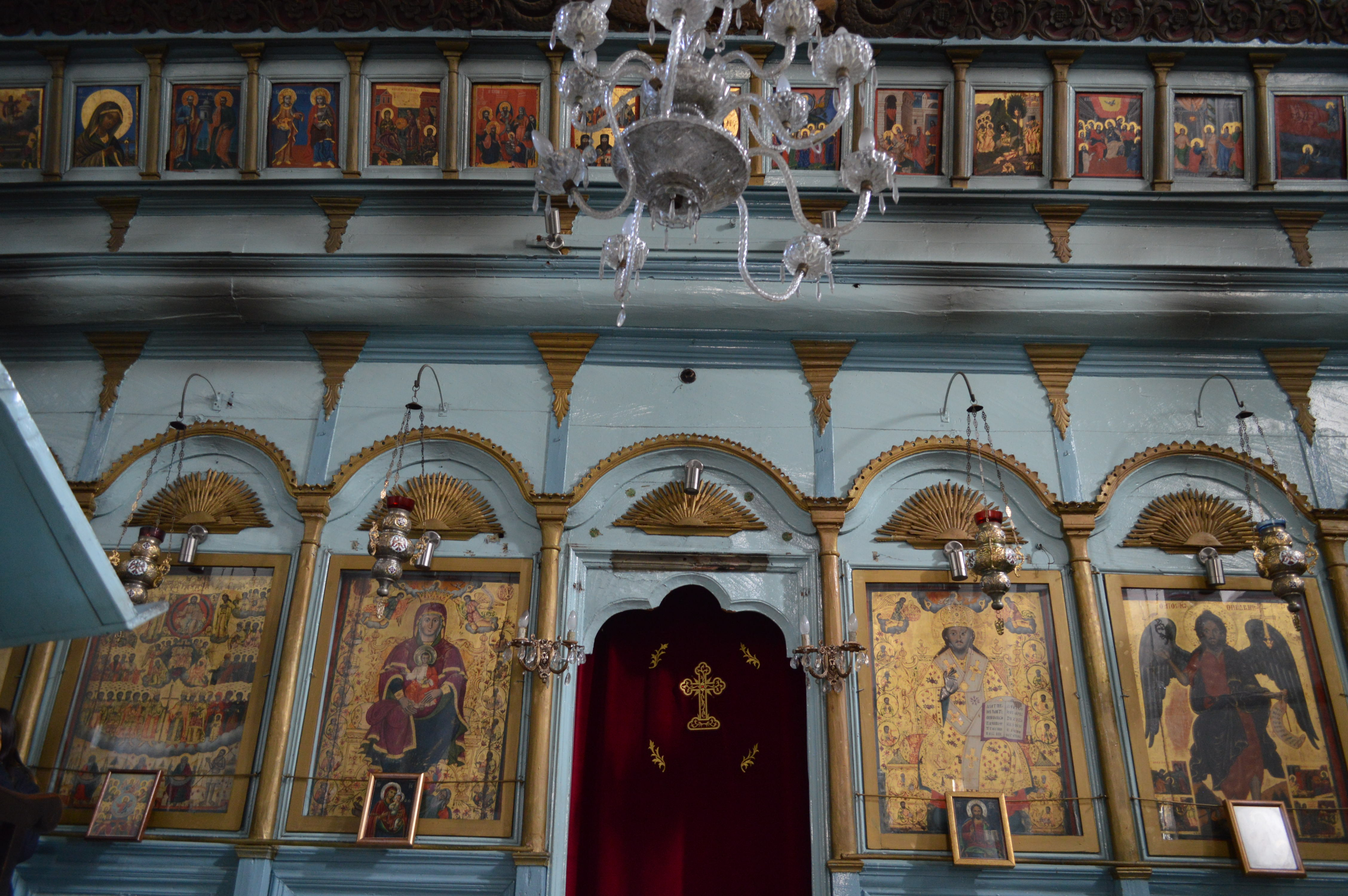 Εσωτερικό του Ναού (15)